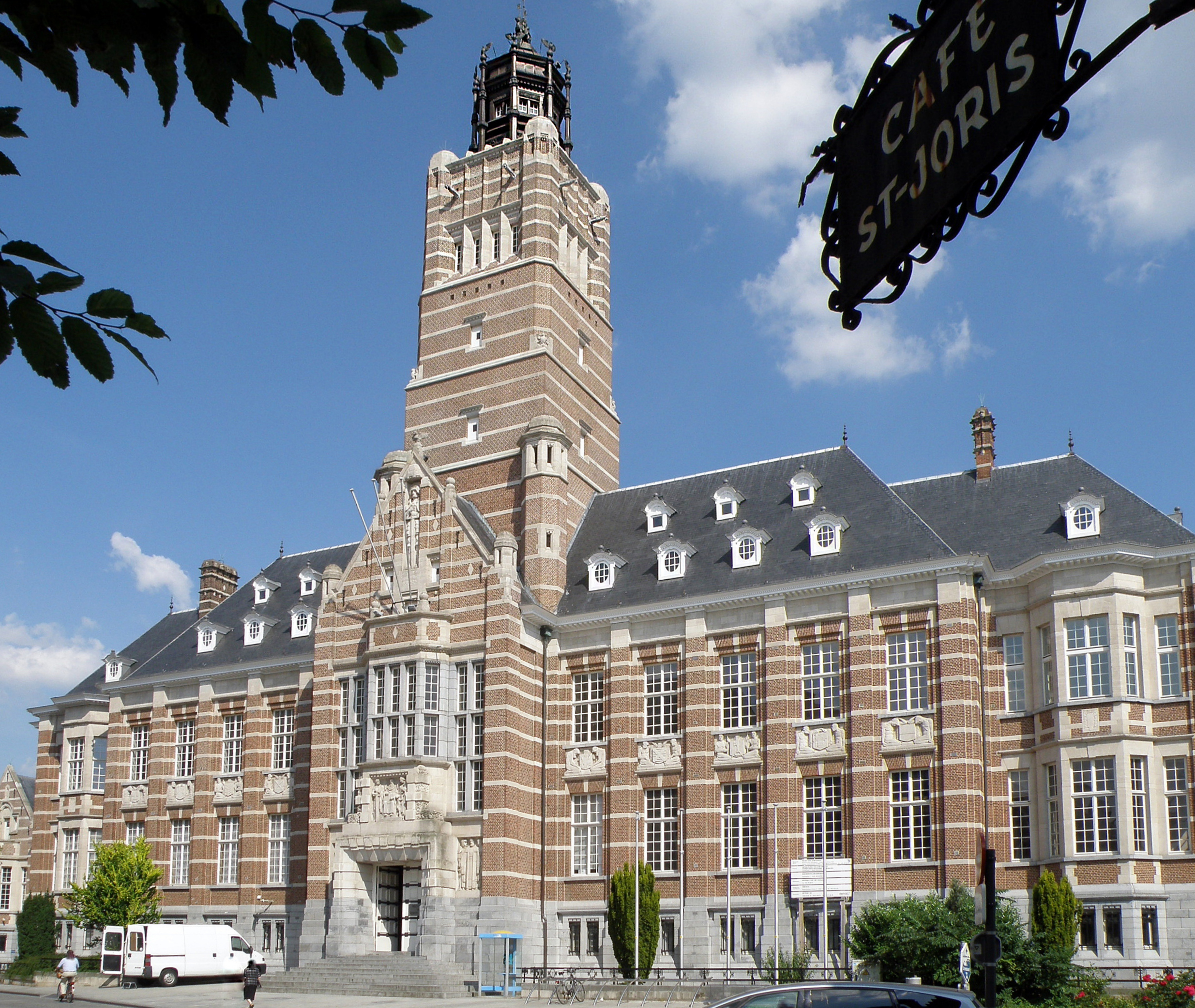 Termonde (néerl. Dendermonde), prov. de Flandre-Orientale, Belgique. Palais de justice, édifice de style expressionniste et éclectique, érigé entre 1923 et 1927, selon les plans de l’archit. Valentin Vaerwijck. Sculptures d’Oscar Sinia.